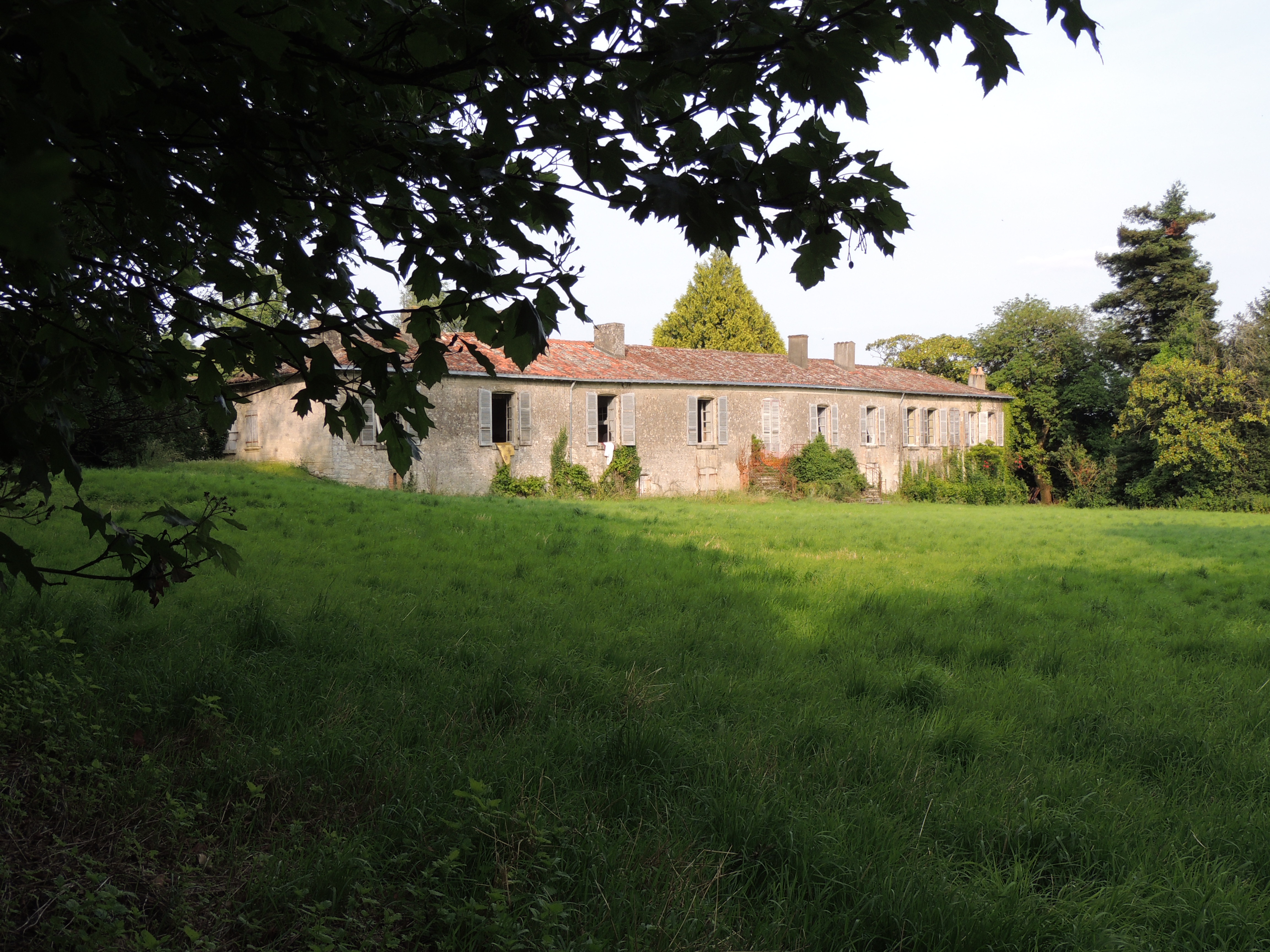 Château du bourg - Façade principale côté parc